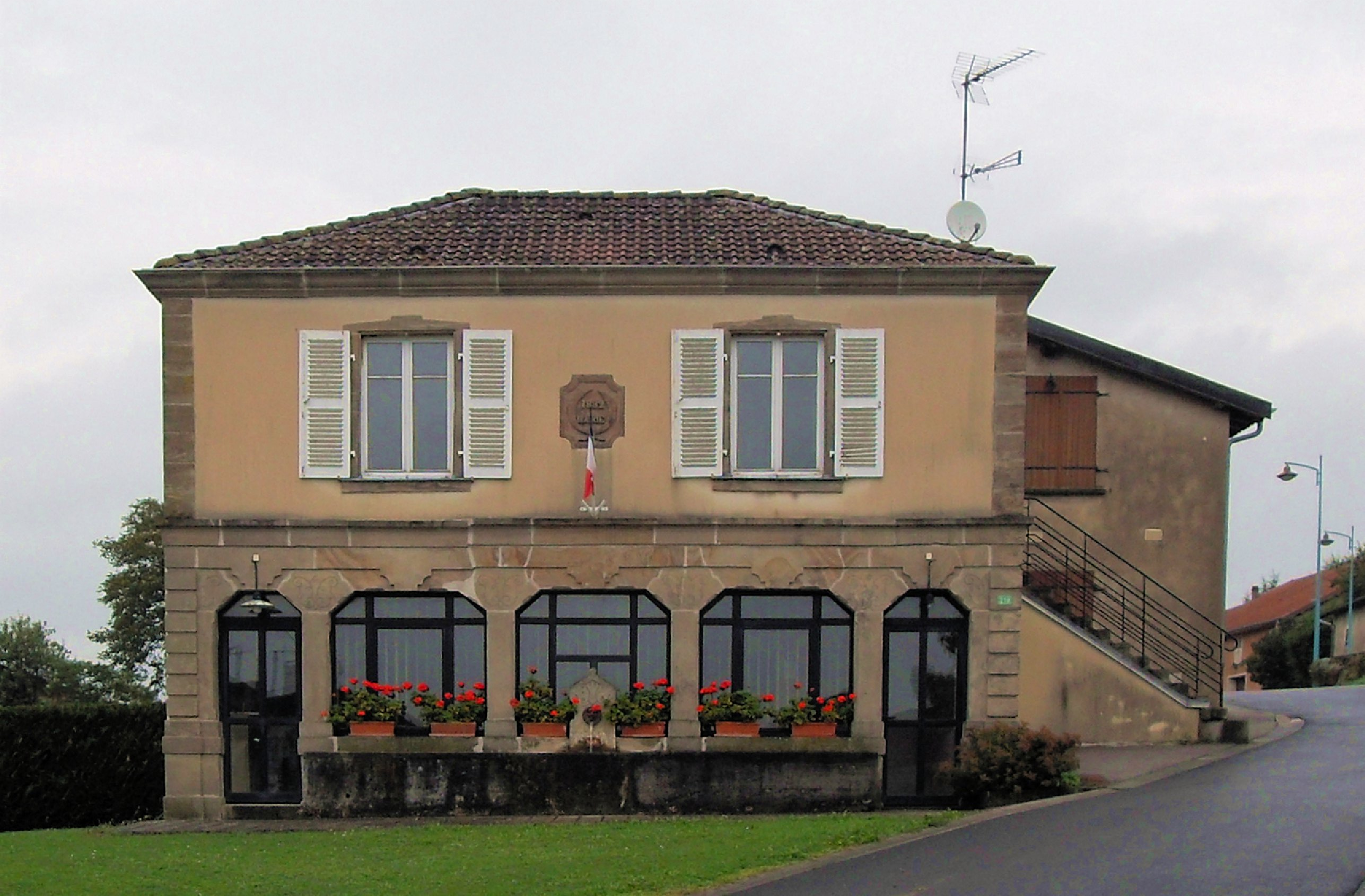 La mairie d'Hagécourt